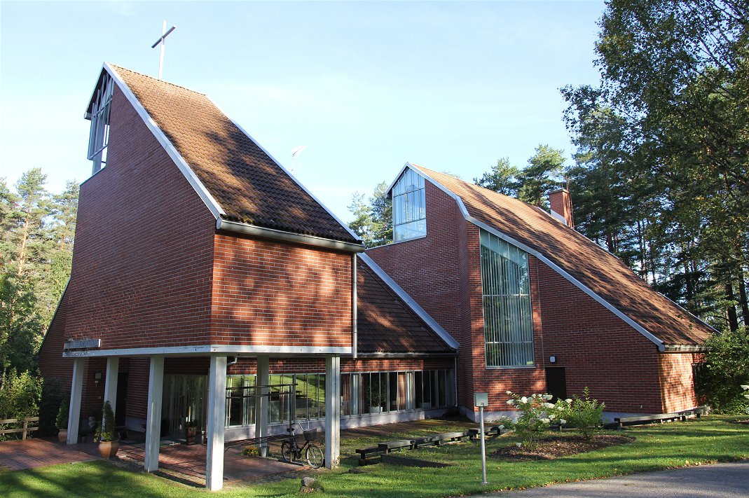 Otavan seurakuntatalo Mikkelin Otavan kaupunginosassa.